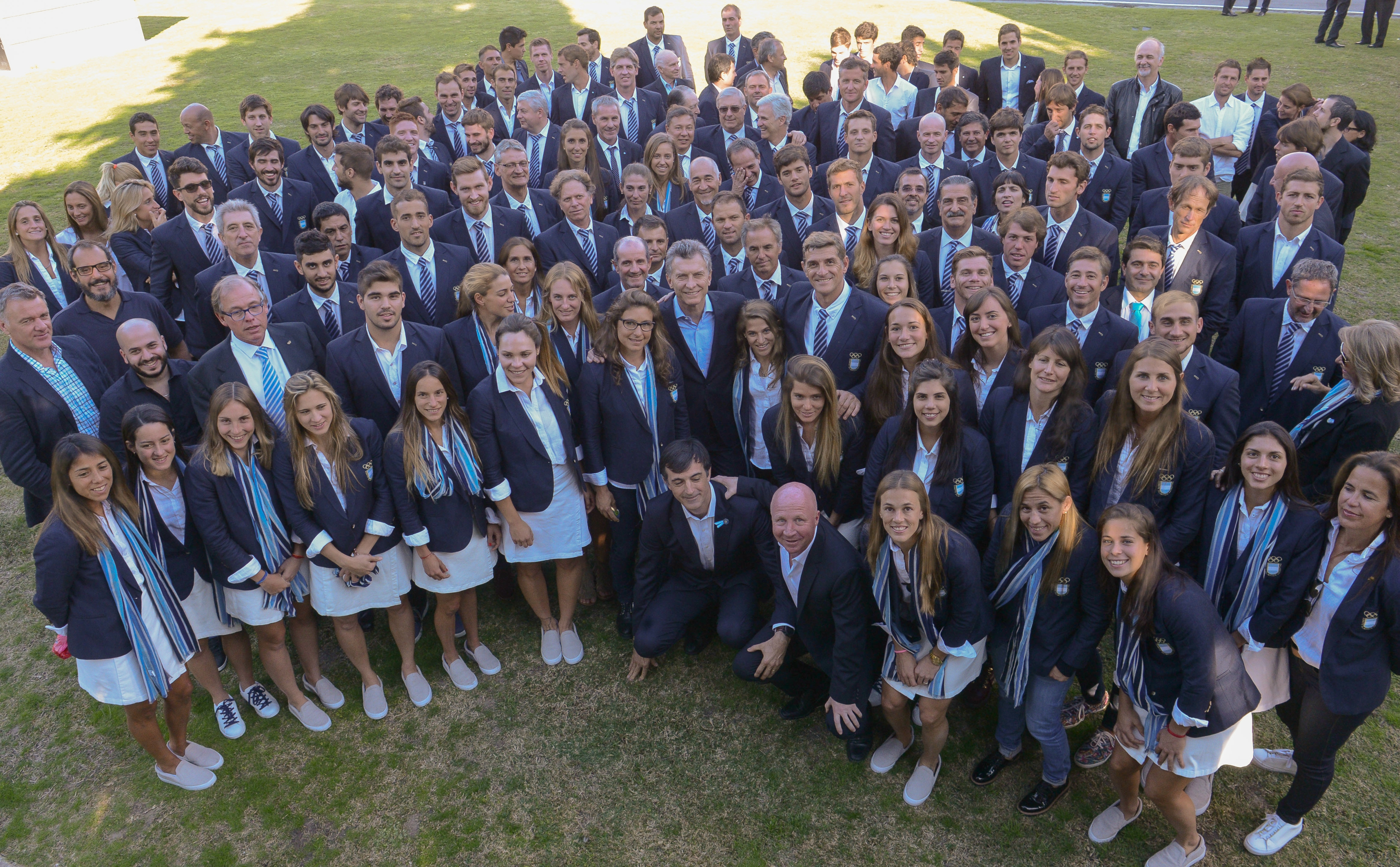 El presidente Mauricio Macri recibió en la Residencia de Olivos a los atletas argentinos ganadores de medallas de oro en los Juegos Olímpicos Río de Janeiro 2016: la judoca Paula Pareto, los yachtistas Santiago Lange y Cecilia Carranza, y los hockistas Carlos "Chapa" Retegui (entrenador), Juan Manuel Vivaldi y Matias Paredes (jugadores). También asistieron a la convocatoria los atletas que cumplieron destacadas actuaciones en la competencia.